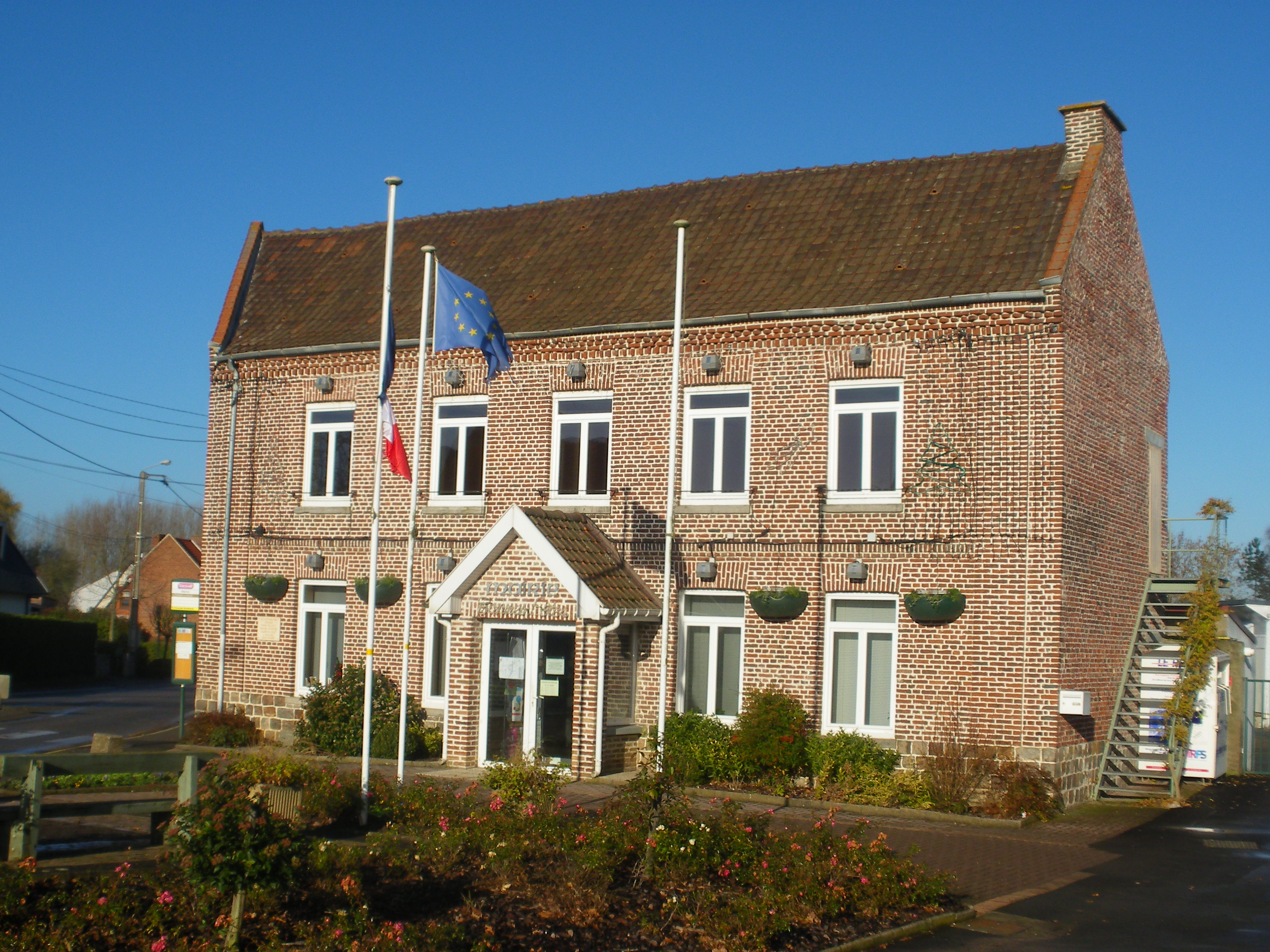 Vue de la mairie d'Hinges.